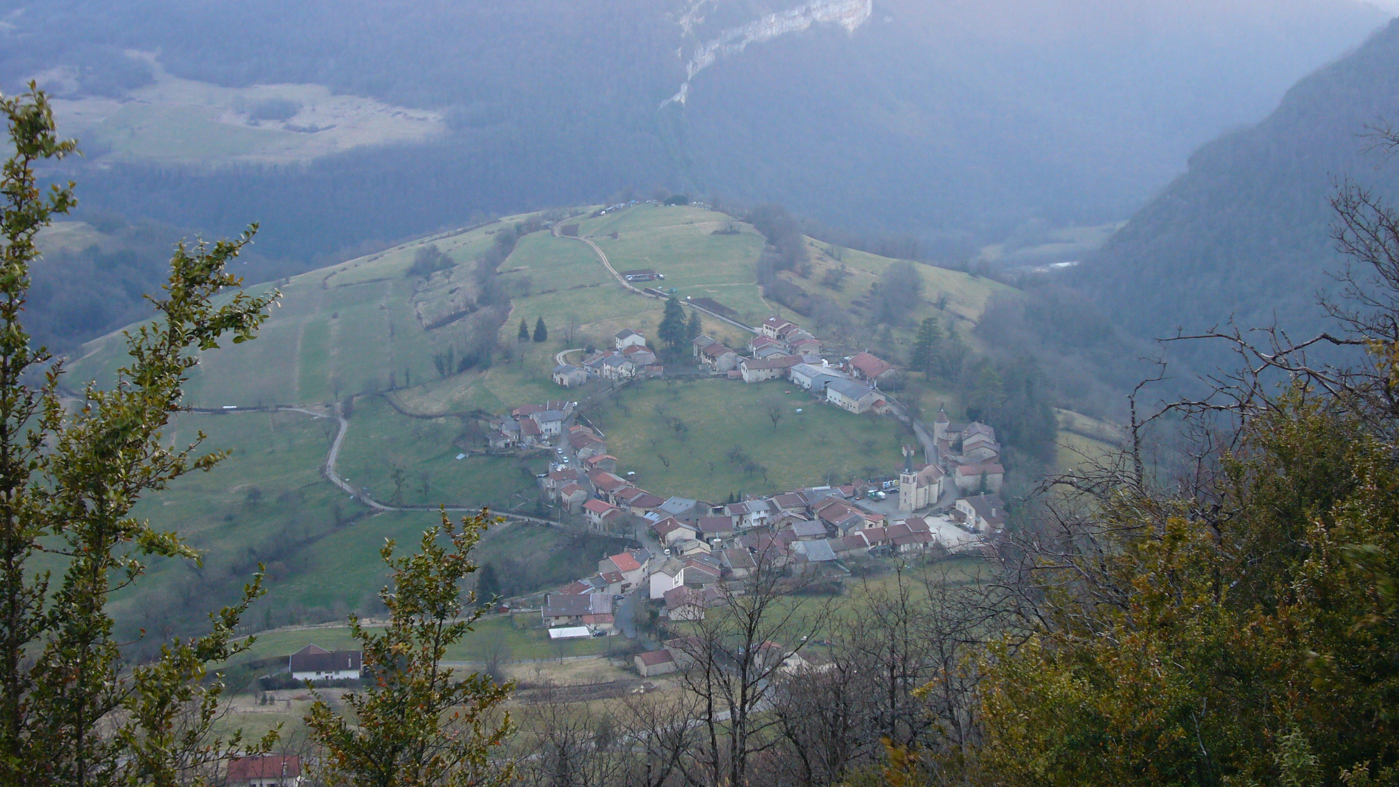 Vue du village d'Oncieu (01230 - Ain) depuis la route départementale D102